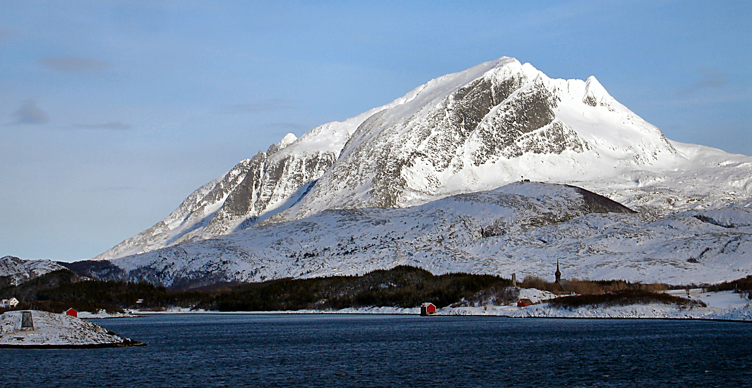 Alstahaug near Sandnesjoen (Norway)